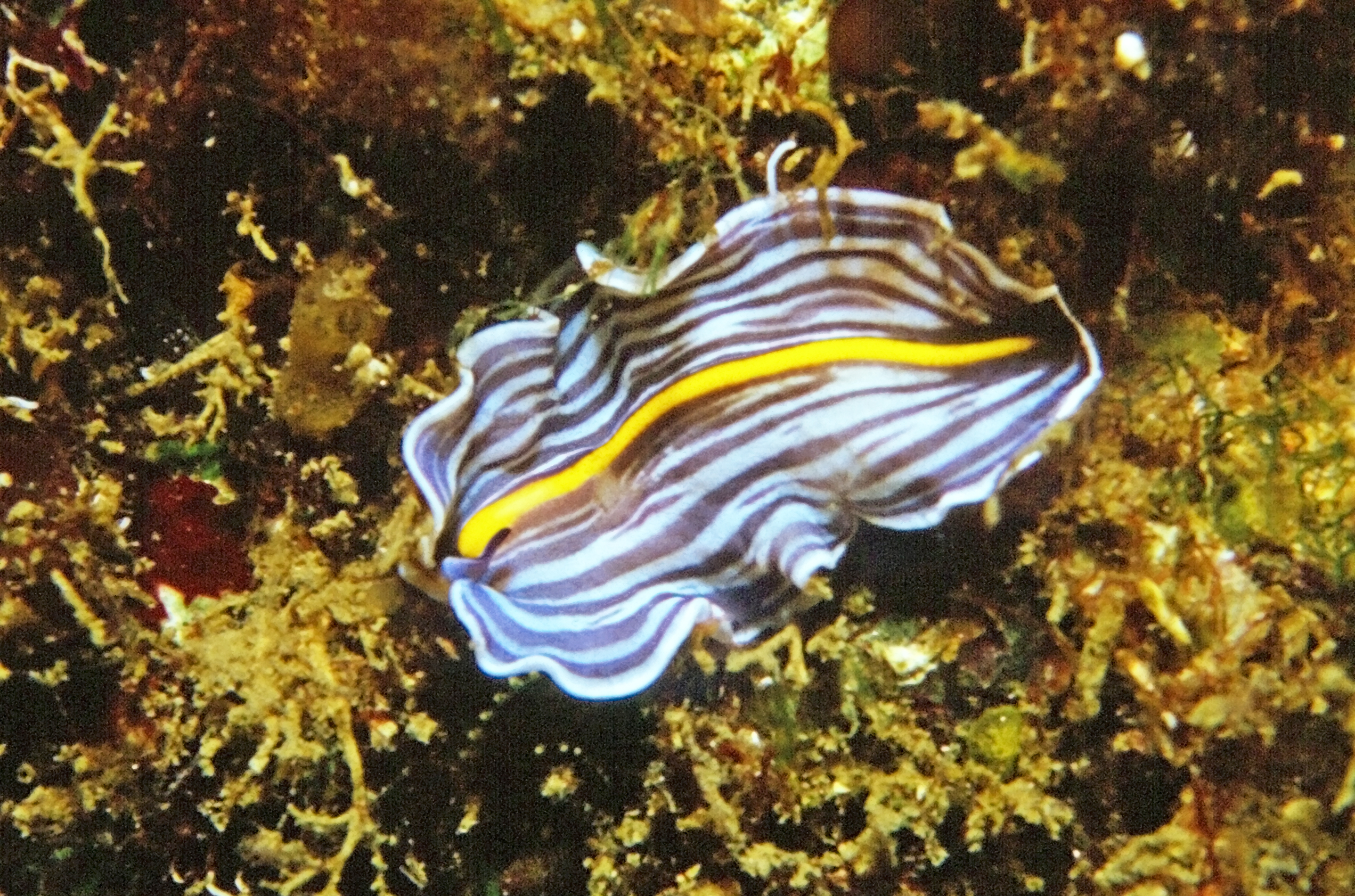 Prostheceraeus giesbrechtii Schmarda, 1859 - Banyuls-sur-Mer : 08/87